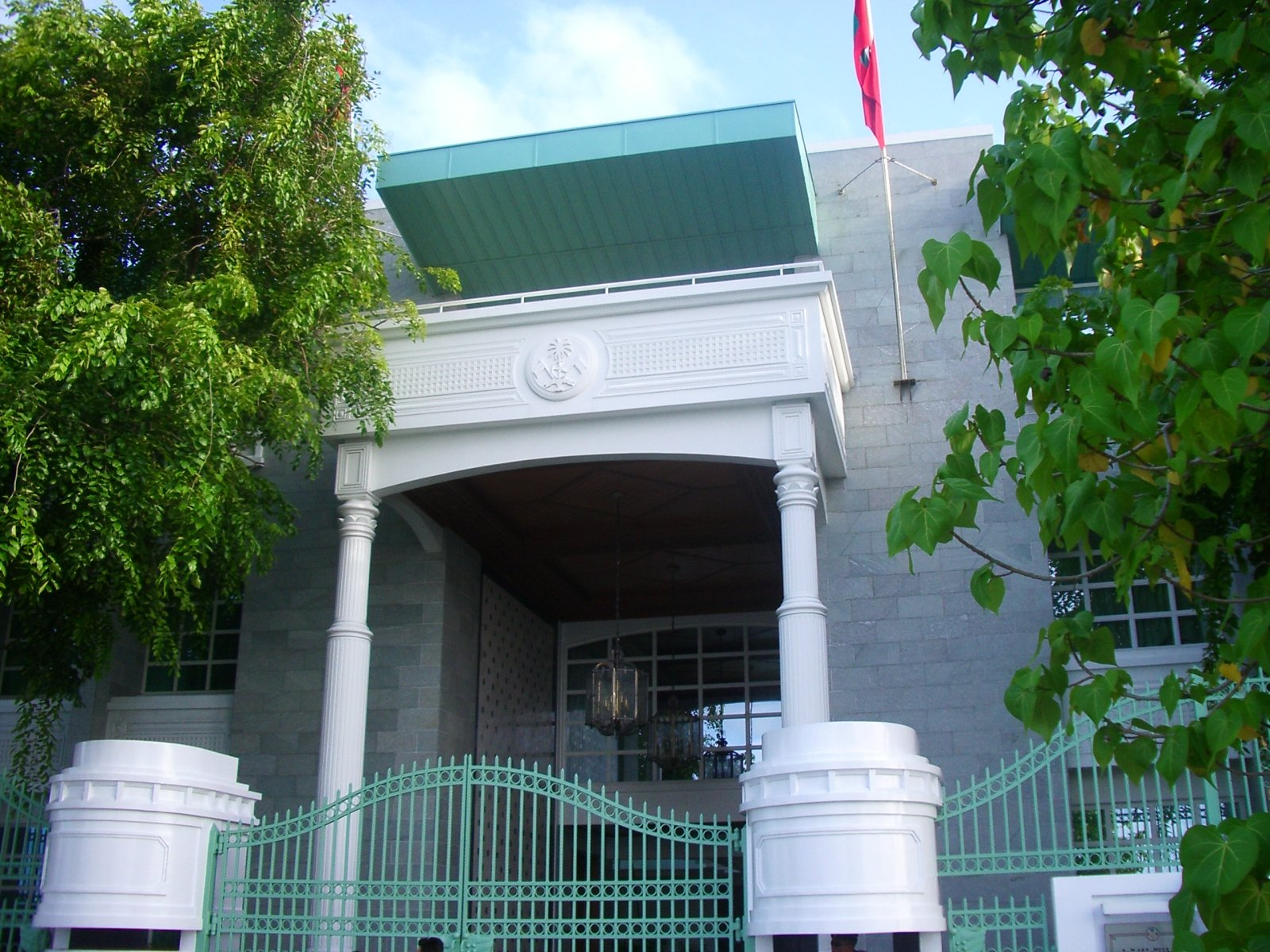 Palau presidencial a Male, amb la bandera nacional (a l'esquerra del observador, tapada per l'arbre) i la bandera presidencial (a la dreta); foto feta per J. Ollé el juliol del 2006.